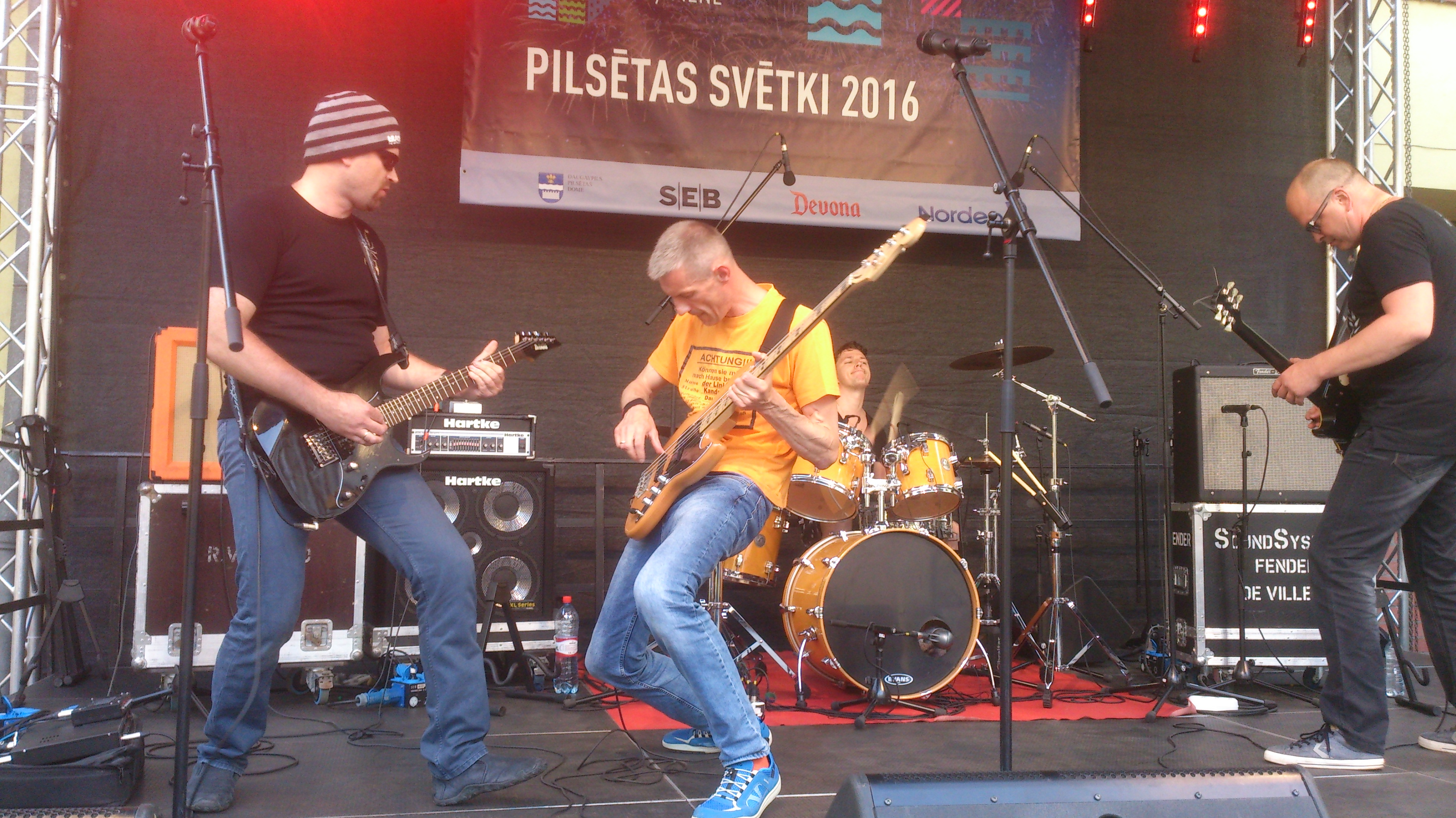 Metrs Daugavpils pilsētas svētkos 2016. gadā. No kreisās: Edmunds Tamanis, Guntars Šembels, Andrejs Zelčs, Uldis Ruļuks